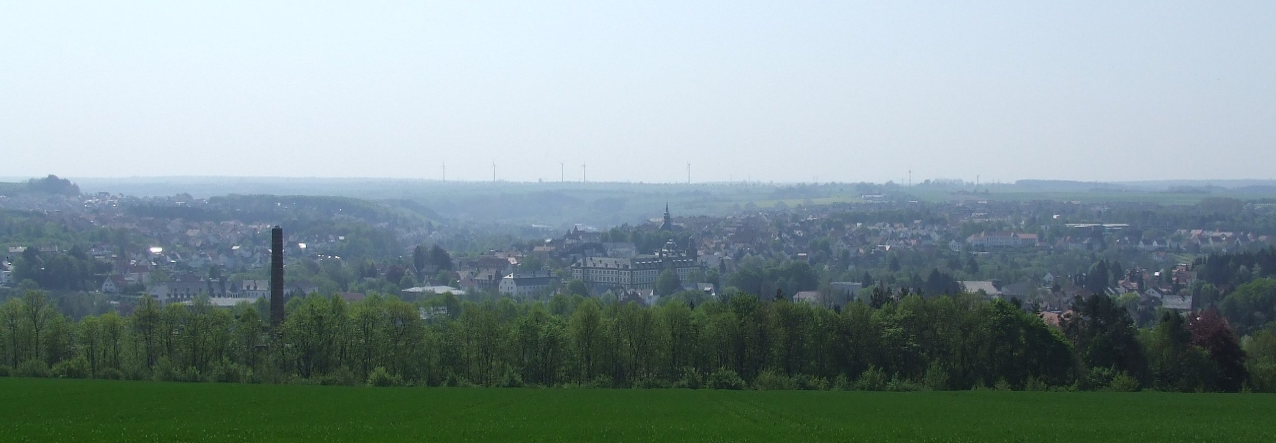 View of Büren, Westfalen